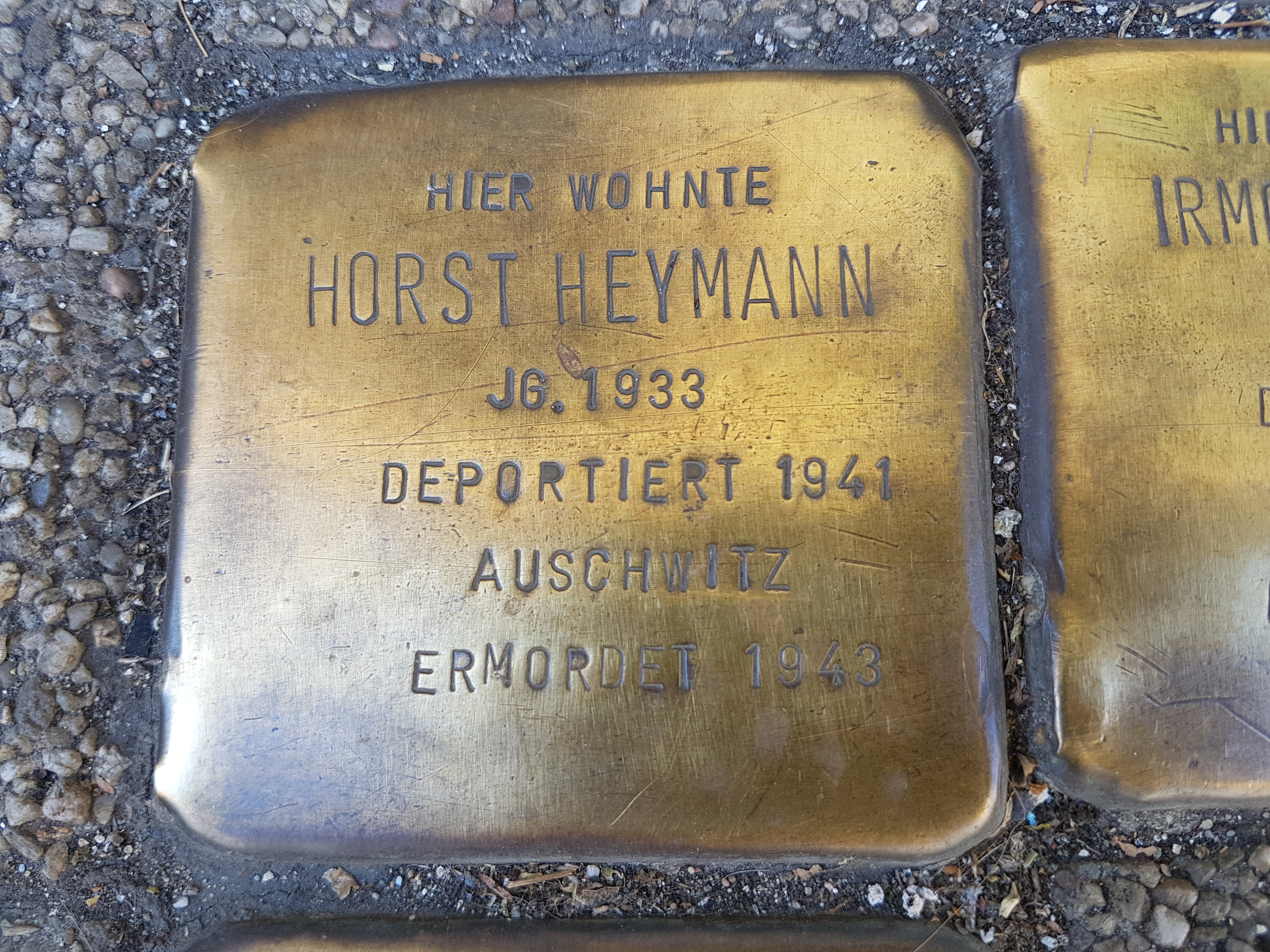 Stolperstein Duisburg Horst Heymann